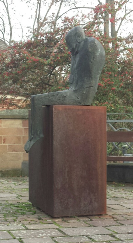 Mahnmal auf dem Kirchvorplatz der Diakoniekirche Bad Kreuznach. Fotografie vom Bürgersteig Bösgrunderweg. Mahnmal sichtbar vom öffentlichen Raum aus.